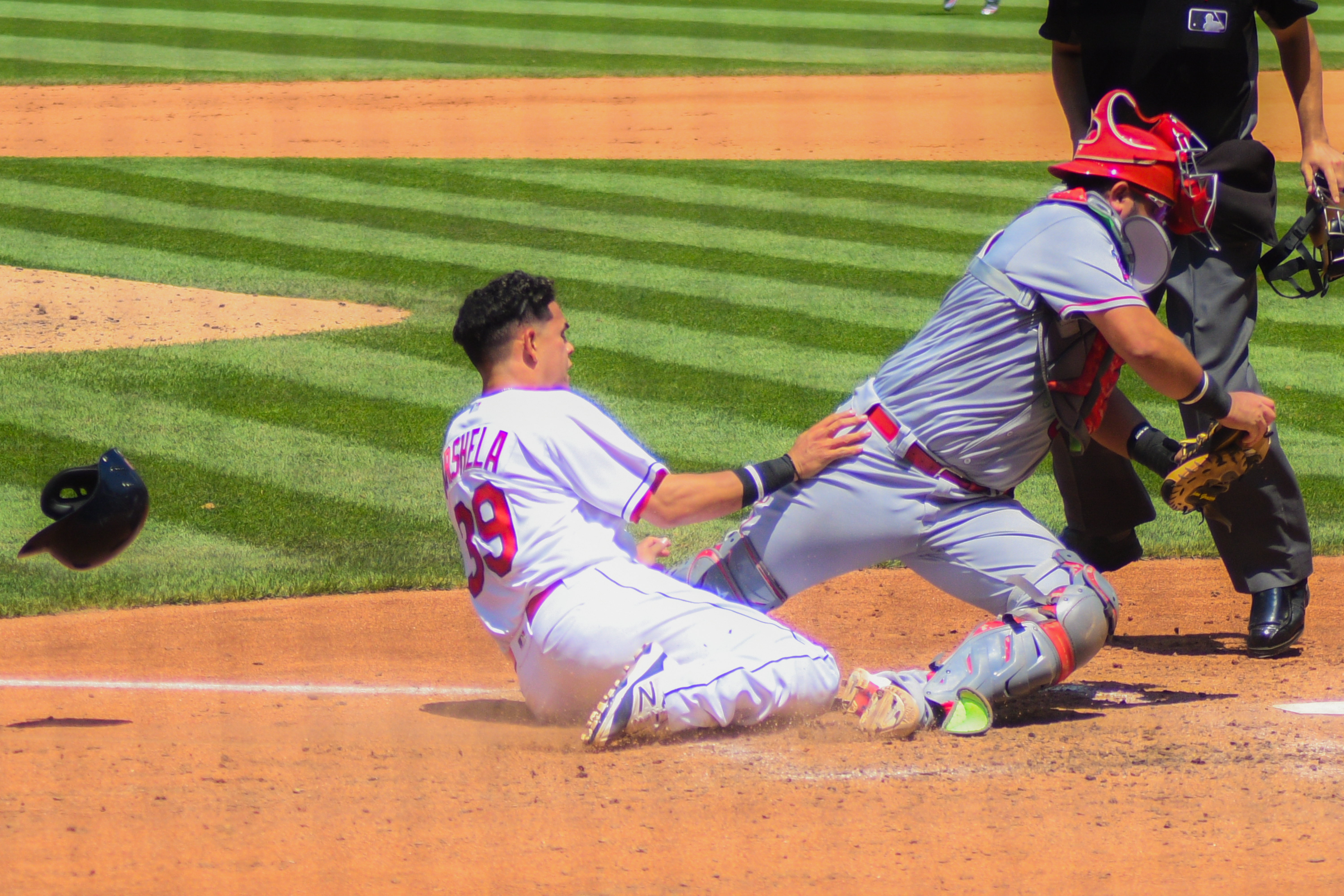 Giovanni Urshela